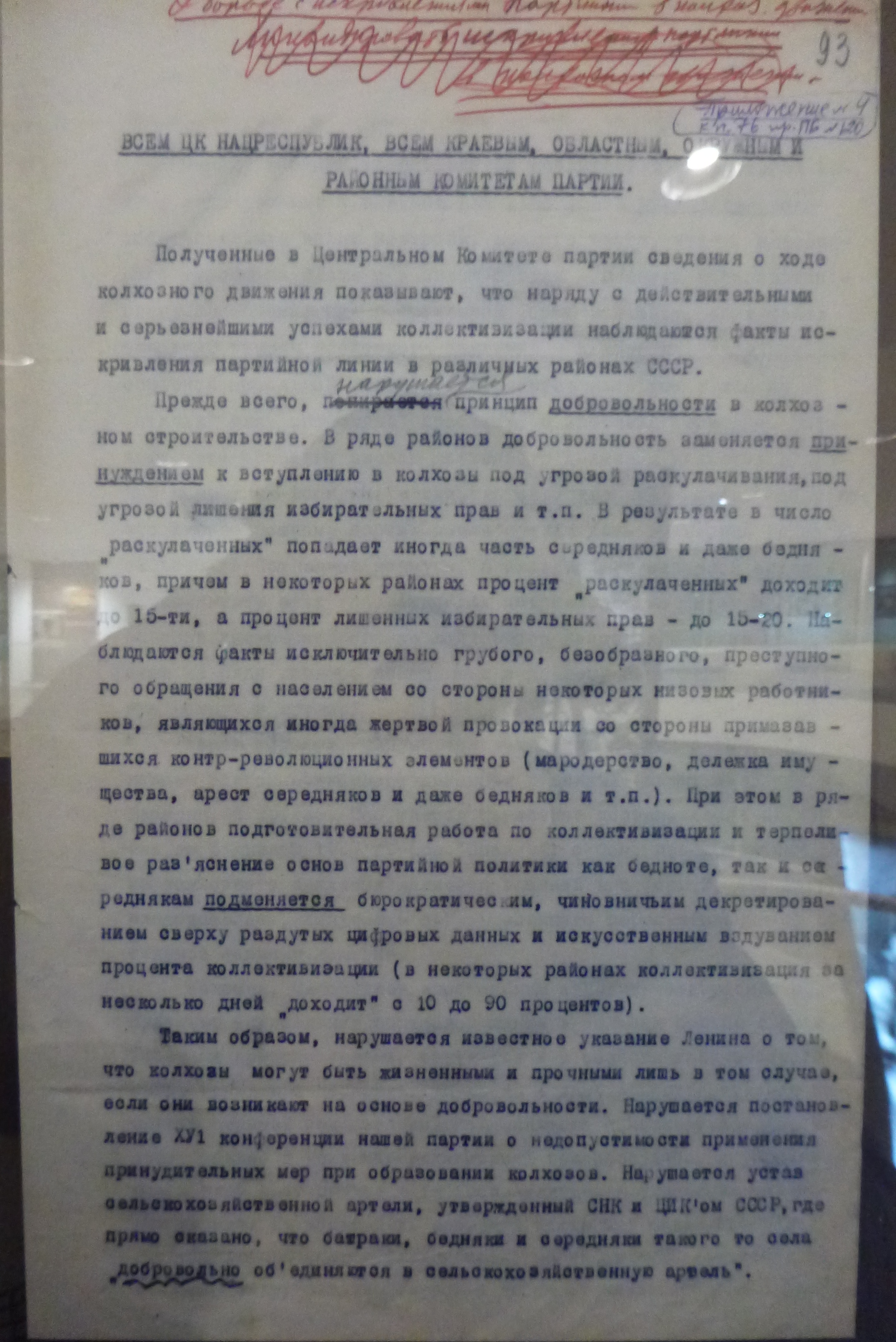 Постановление Политбюро "О борьбе с искривлениями партийной линии в колхозном движении" от 14 марта 1930 года 2 лист (автограф И.В. Сталина - правка). Хранится в РГАСПИ. Ф. 17. Оп. 163. Д. 825. Л. 93 - 96.